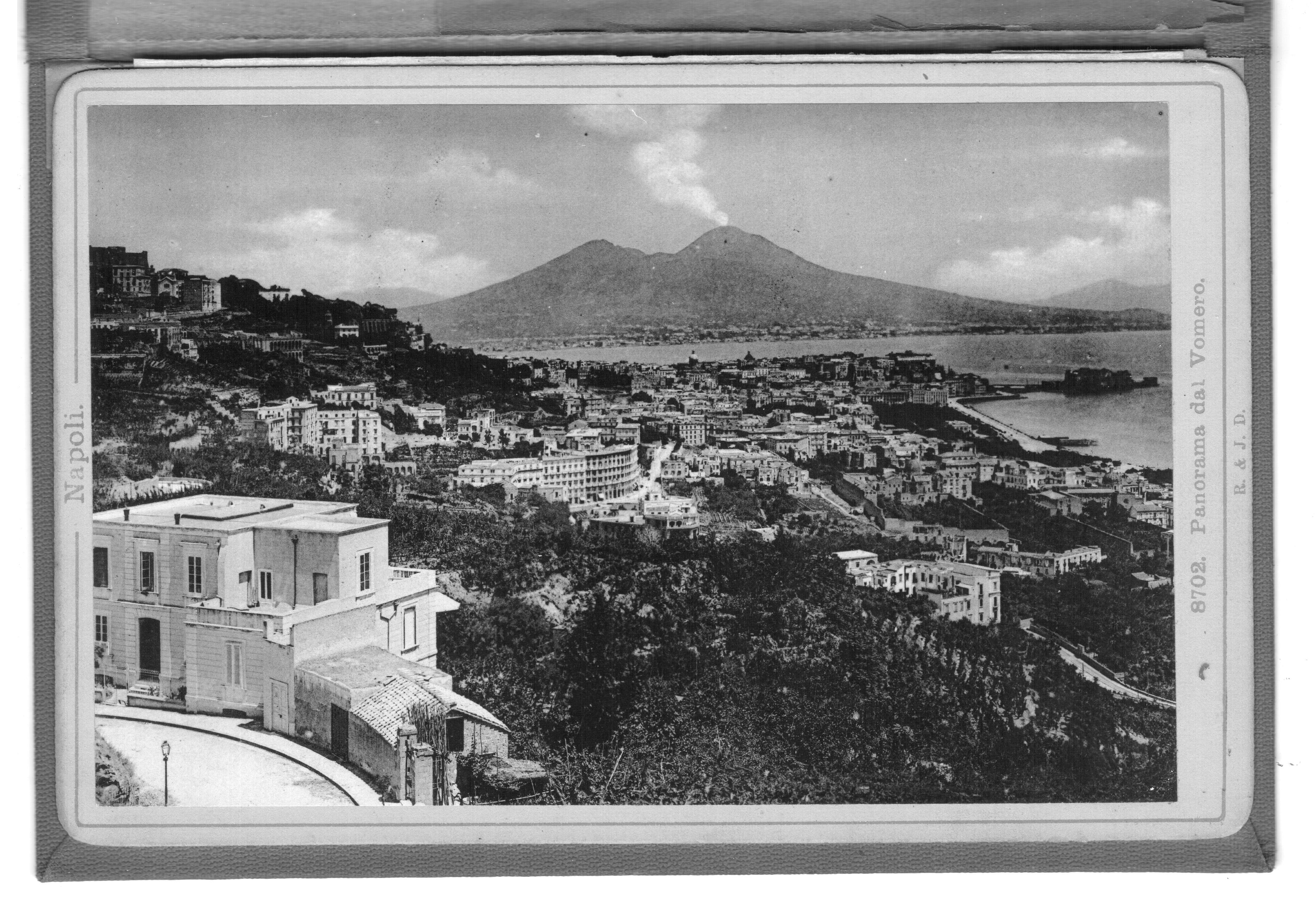 Itália. Nápoly. Römmler & Jonas (Dresden) felvétele. PD-old. A Nápoly című fényképalbum 20, fehér kartonsorozatra ragasztott, fehér vászonnal összefűzött fényképéből. ©© Megjelent Creative Commons alatt a Metapolisz sorozatban. A Metapolisz sorozat valamennyi képe és filmje Creative Commons alatti valamint kereskedelmi - for profit - célra is felhasználható. Ajánlott hivatkozás: Derzsi Elekes Andor: Metapolisz DVD line ©© Published under Creative Commons in the Metapolisz DVD line. All of the photos and vids in the Metapolisz DVD line are under Creative Commons and can be used even for commercial – for profit – purposes. Recommended Citation Derzsi Elekes Andor: Metapolisz DVD line